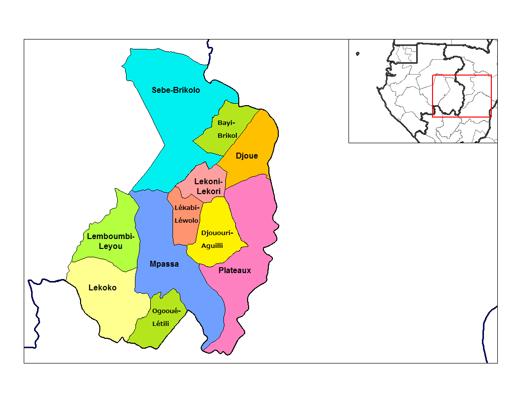 オートオゴウェ州（Haut-Ogooué）の県（Departement）の地図。ガボン2013年国勢調査の資料に基づく：[1]